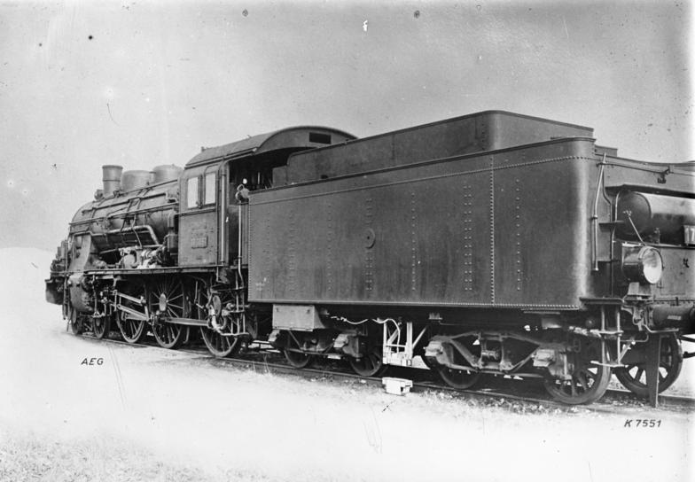 Keine Eisenbahnunglücke mehr! Eine neuartige Zugsicherung an D-Zug-Lokomotiven. Diese Vorrichtung soll das Überfahren des Haupt-Signals unmöglich machen. Bei Überfahren des Haupt-Signals wird eine an dem Tender der D-Zug Lokomotive angebrachte elektro-magnetische Bremsvorrichtung ausgelöst und bringt den D-Zug sofort zum Stehen. Der Vorgang ist eine Übertragung elektro-magnetischer Kräfte vom Haltesignal auf die Lokomotive und deren Zug-Bremse. Die Lage der neuartigen elektromagnetischen Brems-Vorrichtung (x) am Tender einer schweren D-Zug-Lokomotive.